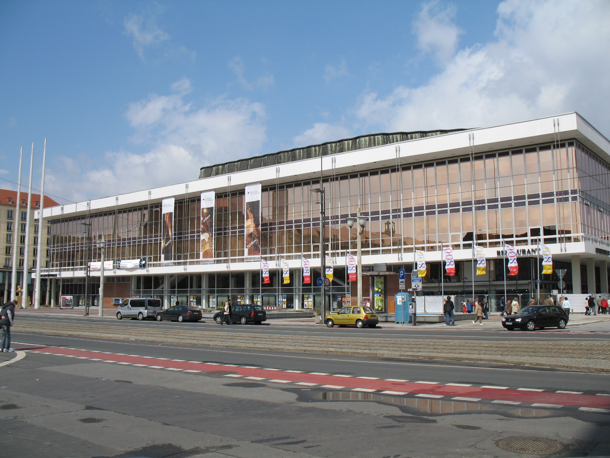 Der Kulturpalast Dresden gesehen vom Altmarkt, davor die Willsdrufer Str.